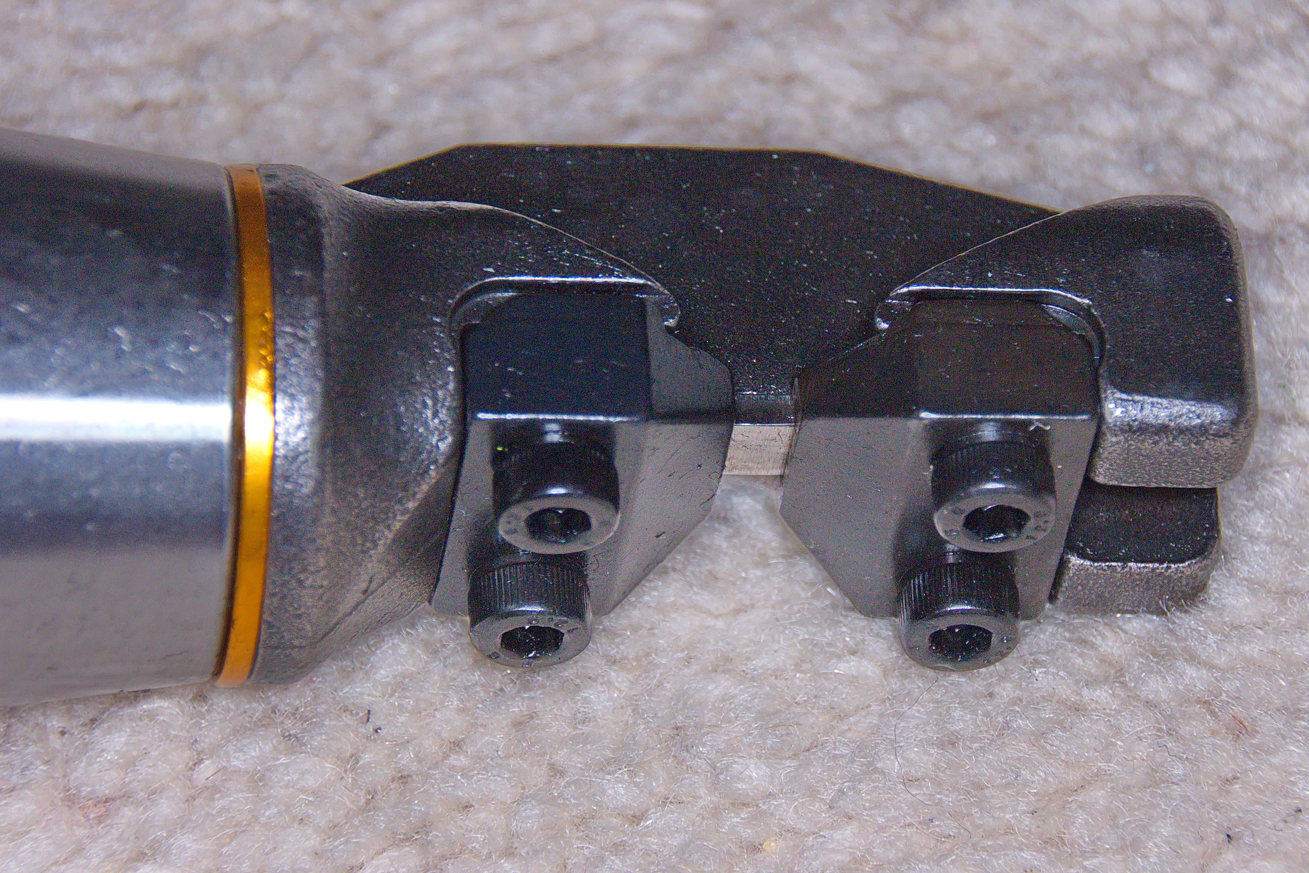 Handgeführter elektrisch angetriebener DEMA Blechnibbler BN 2,5/4,0 mm, Stanzwerkzeug